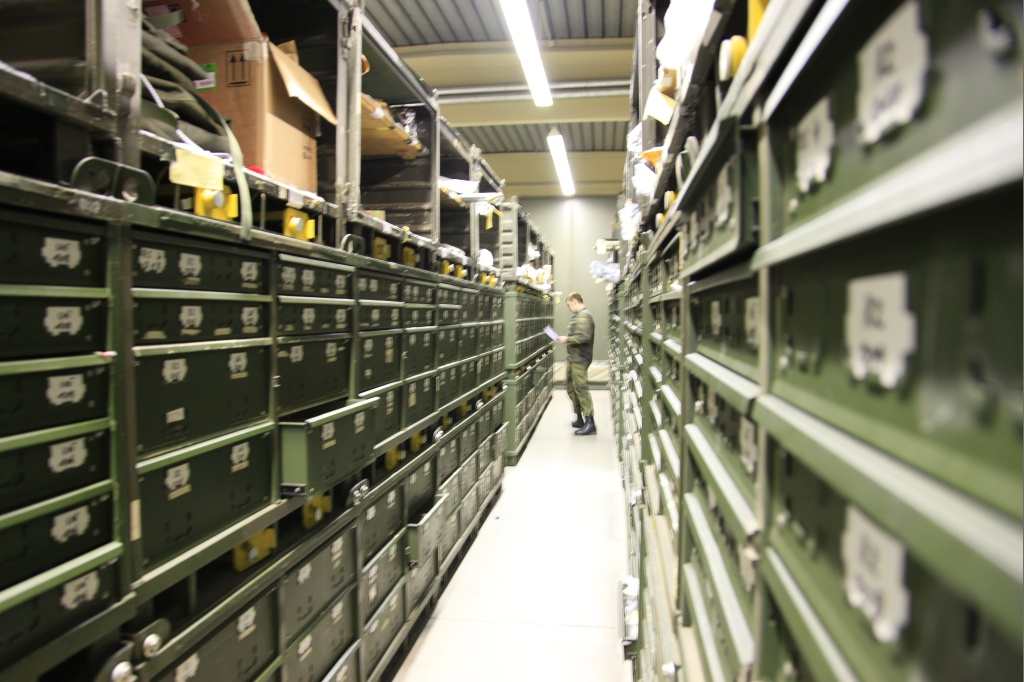 Der E-Zug Rgt15